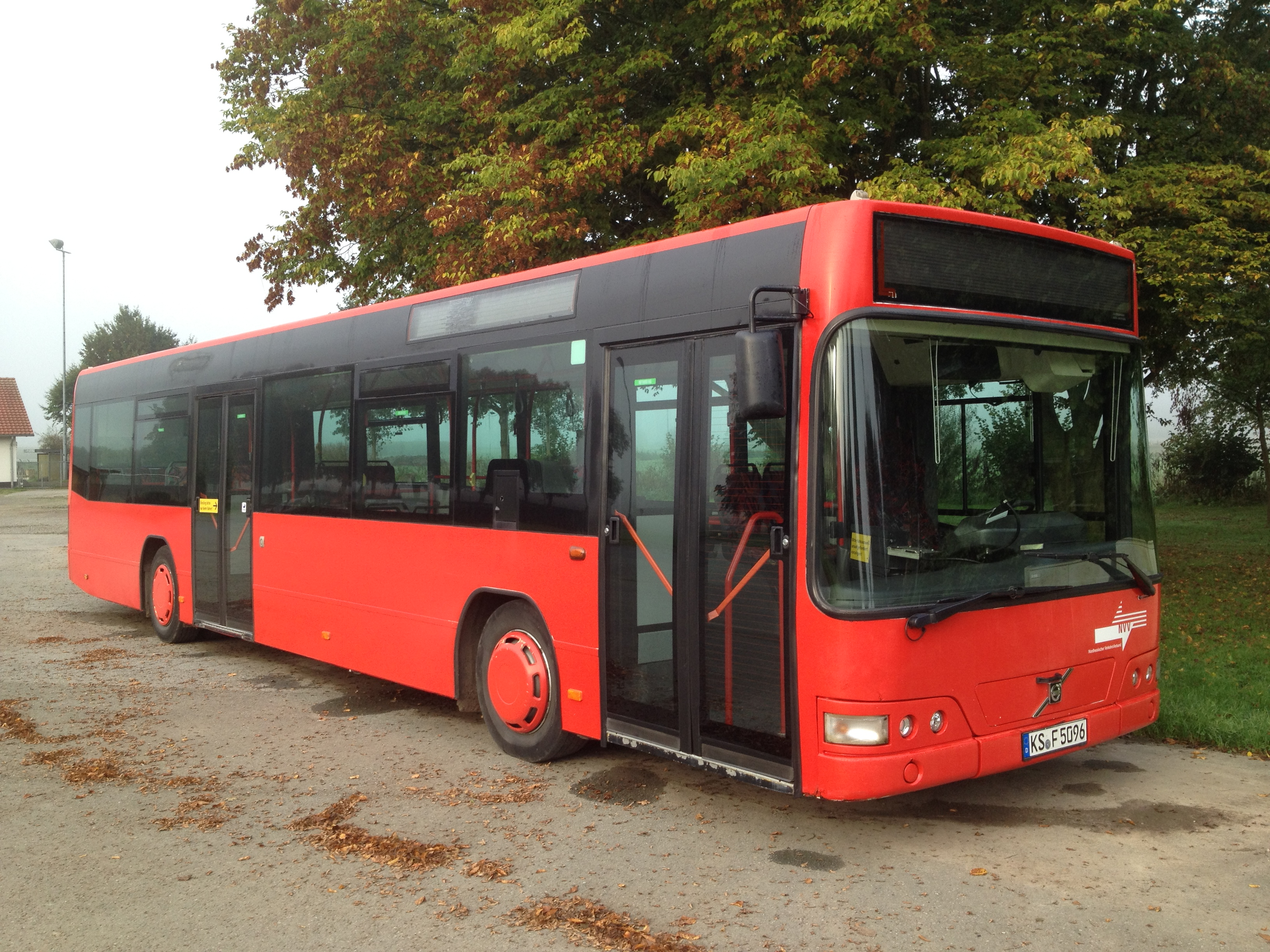 Bus (Volvo 7000) der Omnibusbetrieb Sallwey GmbH am Sportplatz Hümme